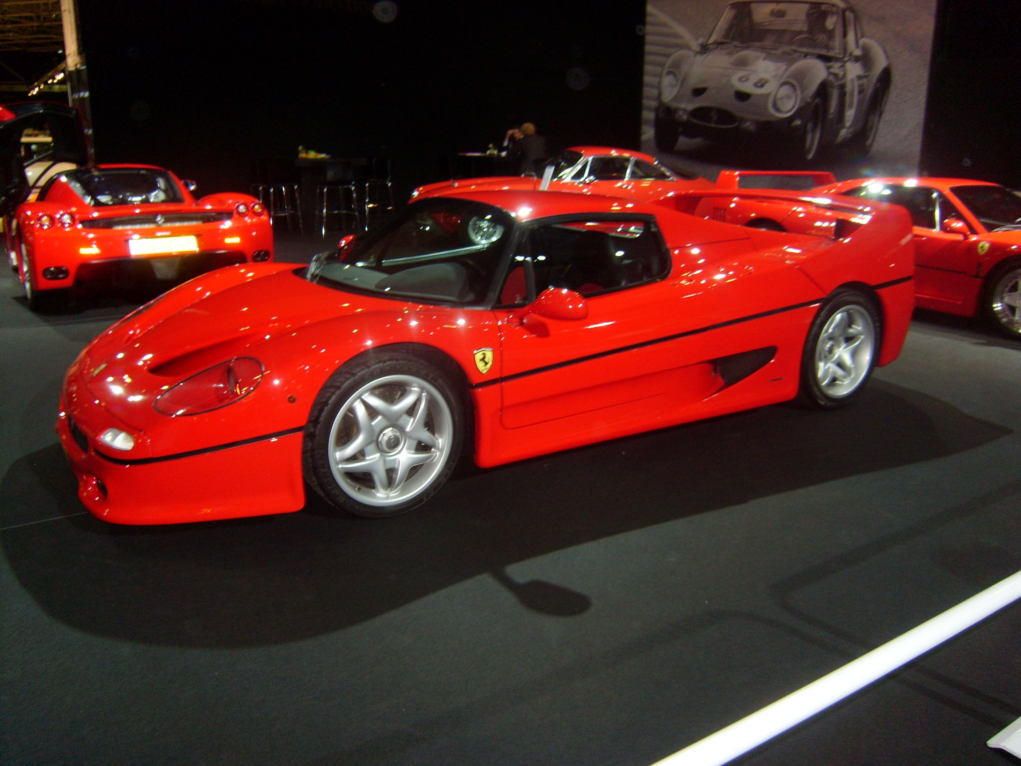 een rode ferrari f50 in amsterdam.